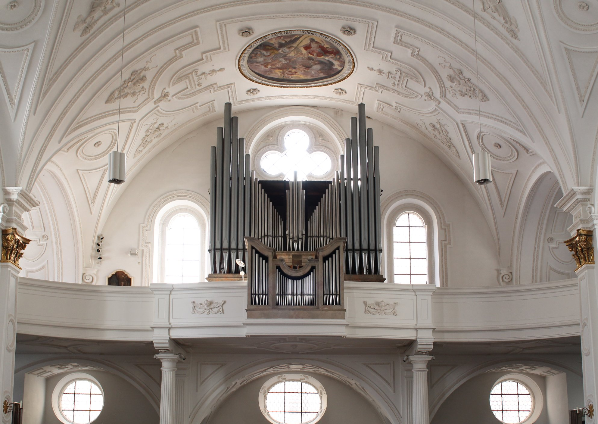 Orgel Stadtpfarrkirche Mariae Himmelfahrt in Weilheim in Oberbayern (1970, M. Offner, III/41)